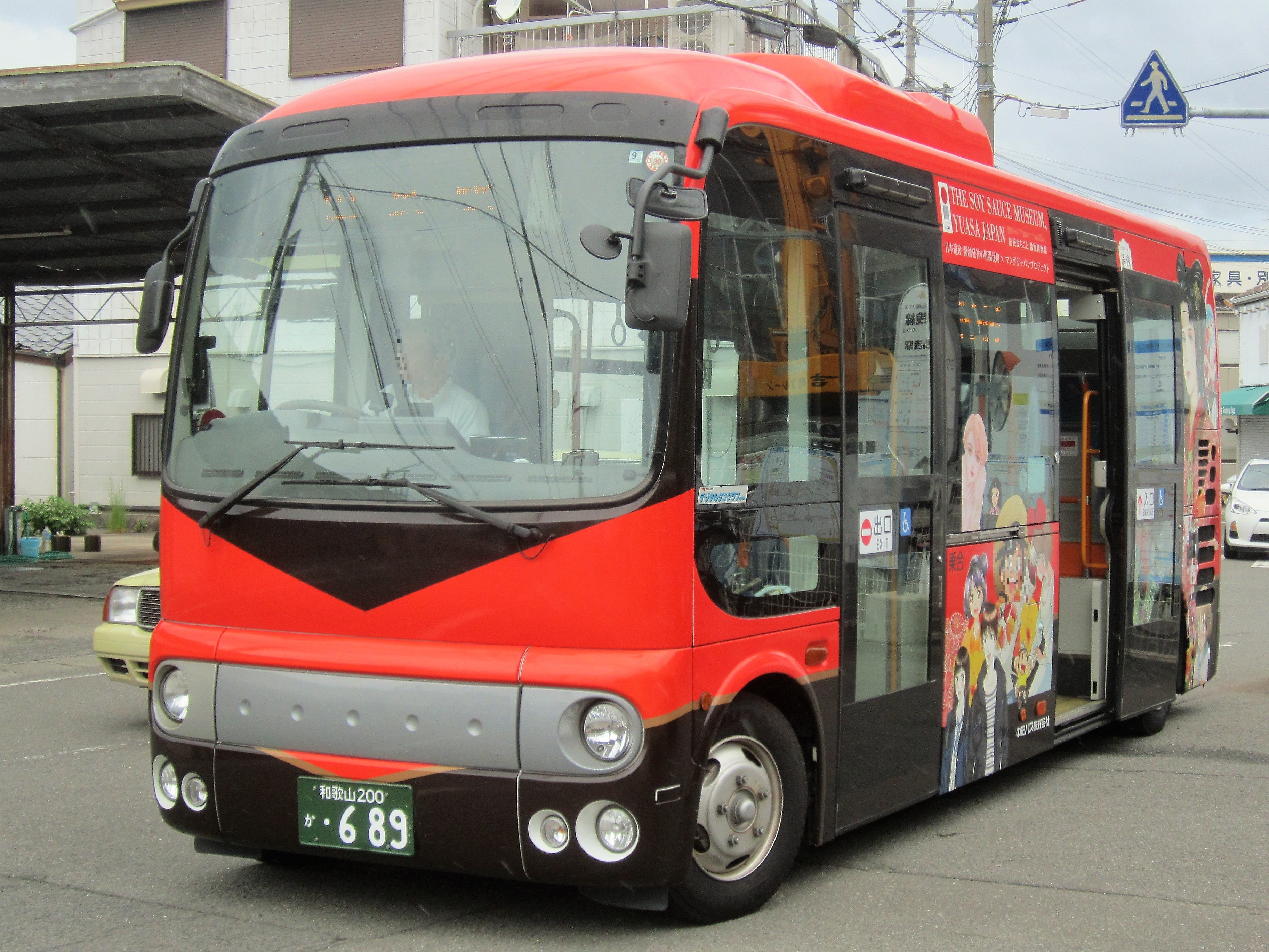 湯浅駅前に停車中の中紀バス